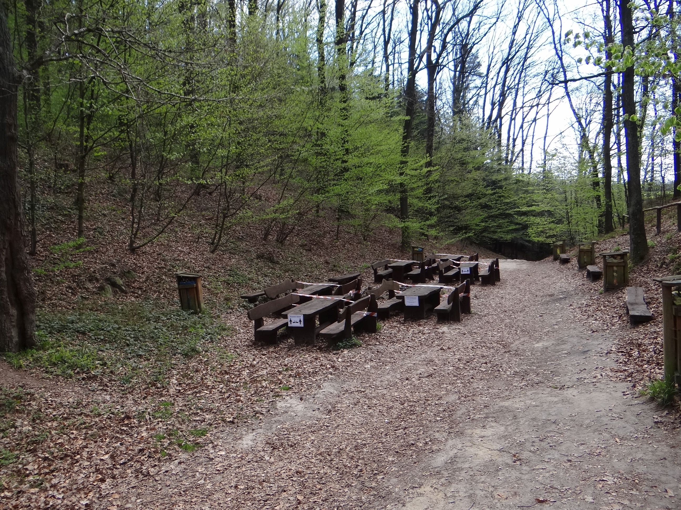 Polanka Harcerzy w Wąwozie Harcerzy w Skamieniałym Mieście w Ciężkowicach